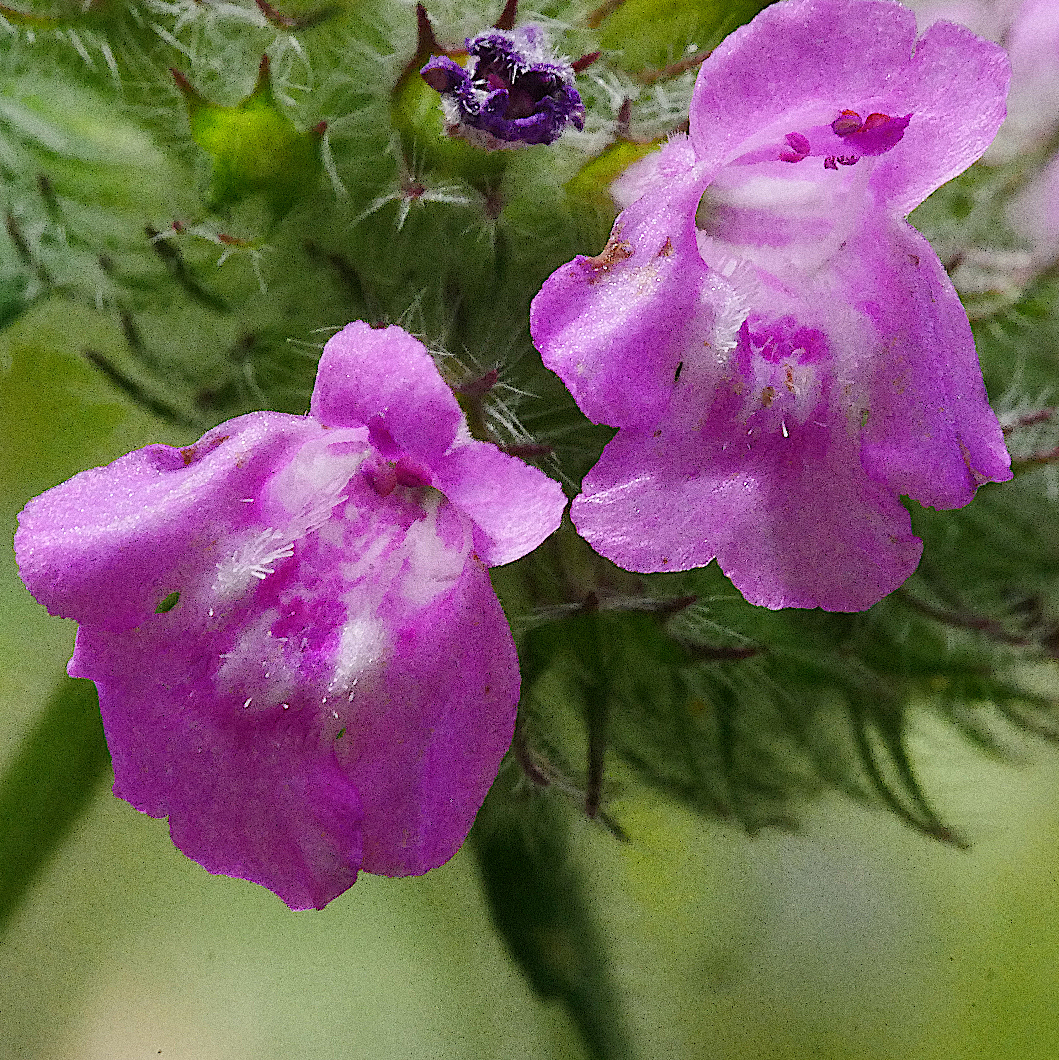 Gemeiner Wirbeldost (Clinopodium vulgare) im Freilichtmuseum Roscheider Hof. Standort: Nordlich des Birgartens auf der Süd- und Ostseite des Wiegehäuschens auf Kies und zwischen Pflastersteinen.